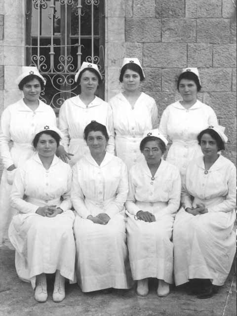 האחיות ב'הדסה' בשנת 1921 באדיבות נירה ברטל